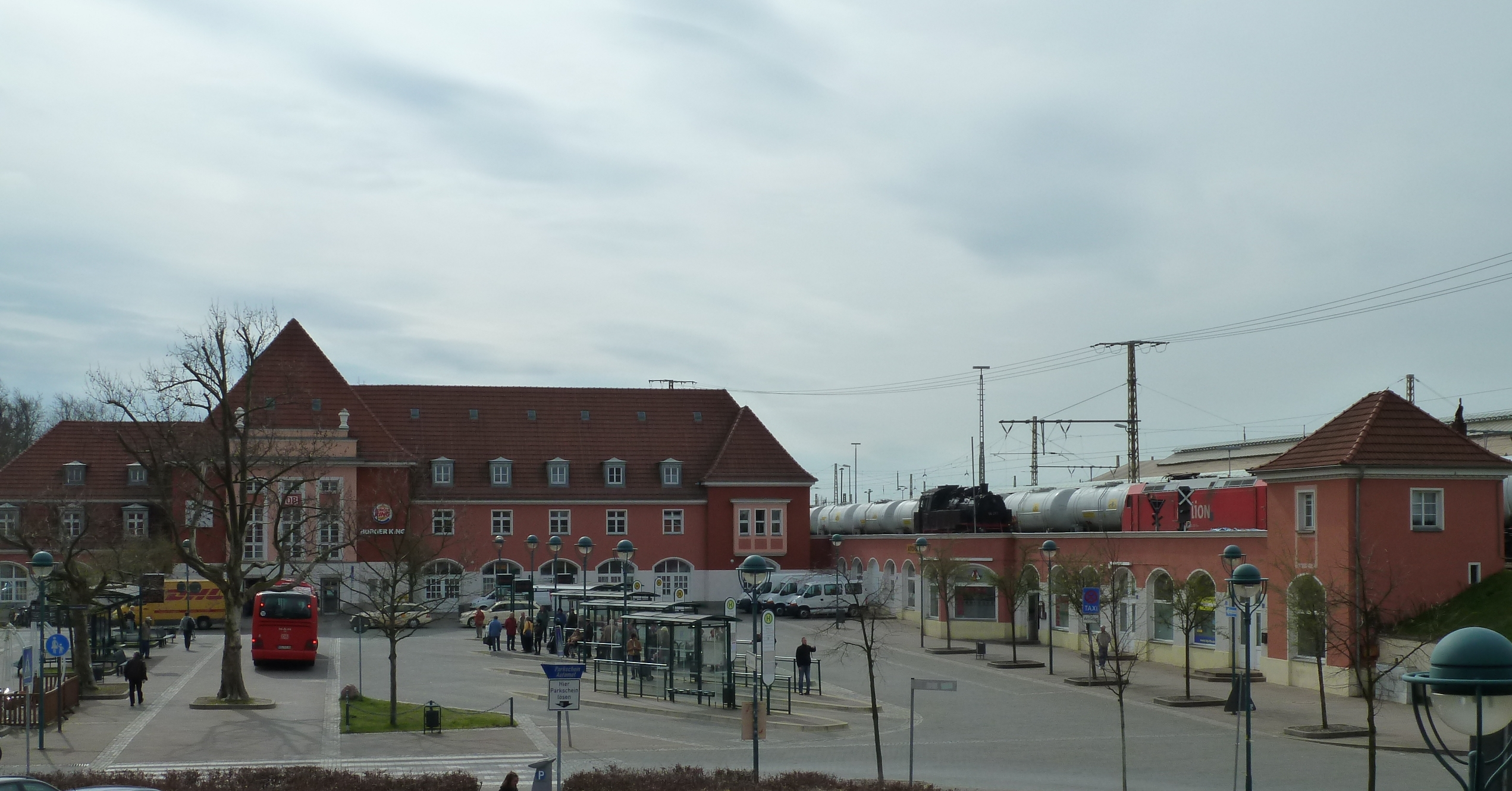 Bahnhof Frankfurt (Oder), Bahnhofsvorplatz